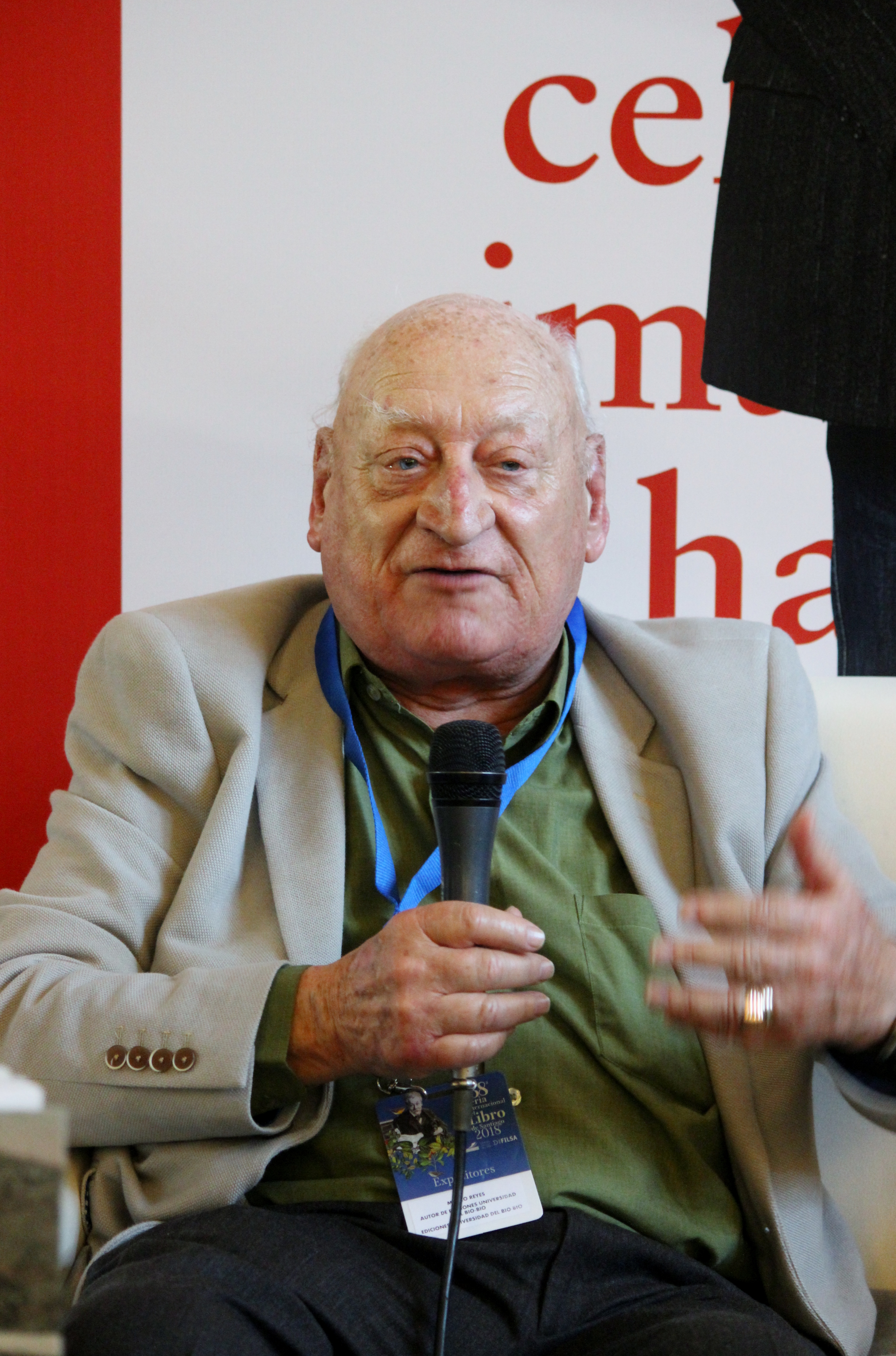 El historiador Marco Aurelio Reyes, decano de la Facultad de Educación y Humanidades de la Universidad del Bío-Bío durante la presentación del libro Los baños minerales de Chillán del que es coautor con Armando Cartes en la Feria Internacional del Libro de Santiago 2018 (sala Lily Garafulic, 10 de noviembre).